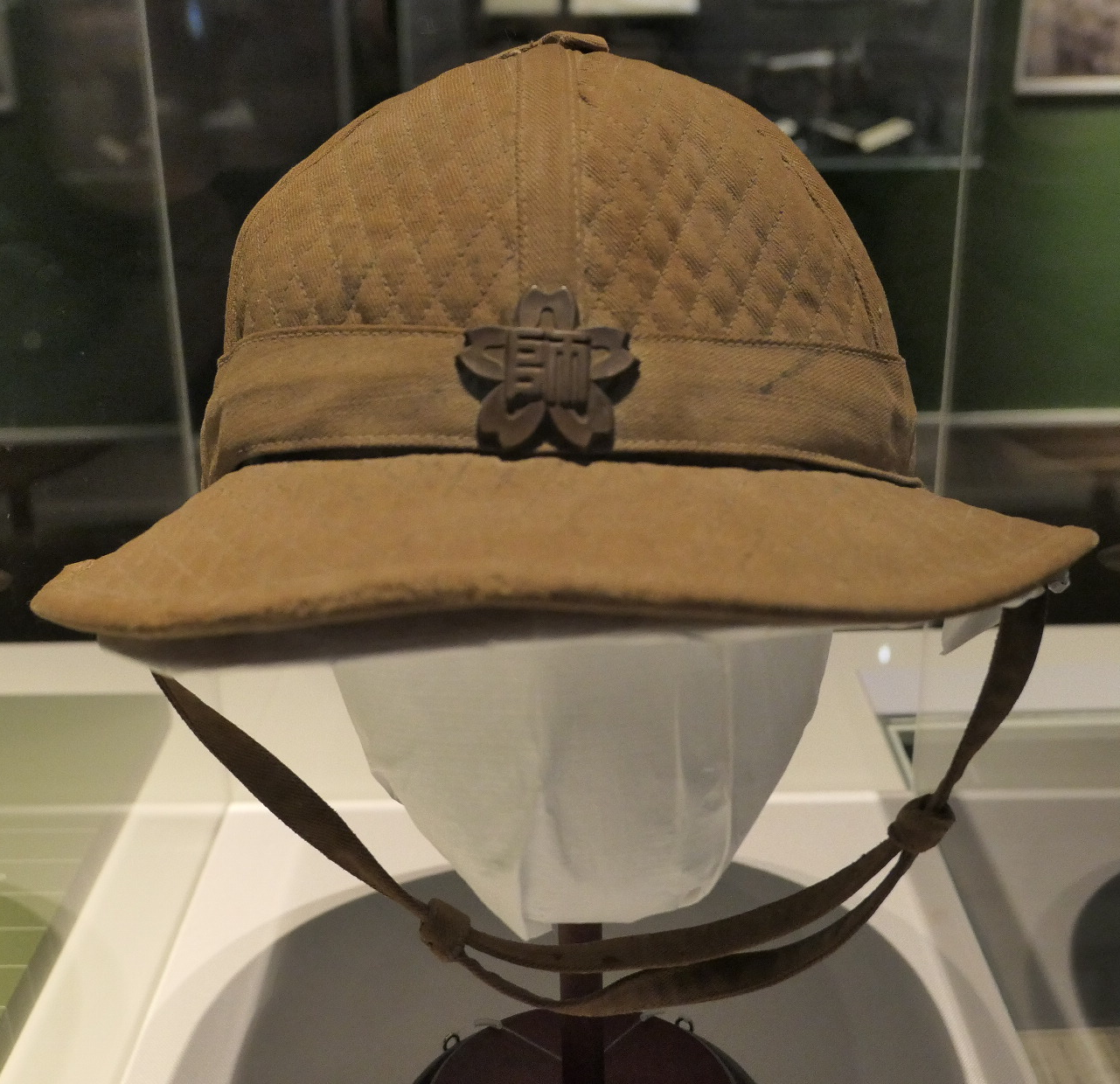 中文（台灣）: 日本時代臺南師範學校帽。攝於國立臺灣歷史博物館。